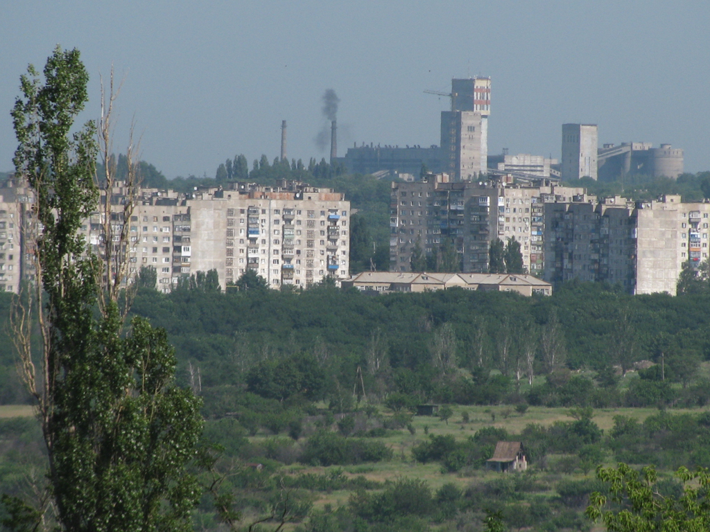 шахта «Прогрес» (м. Чистякове)